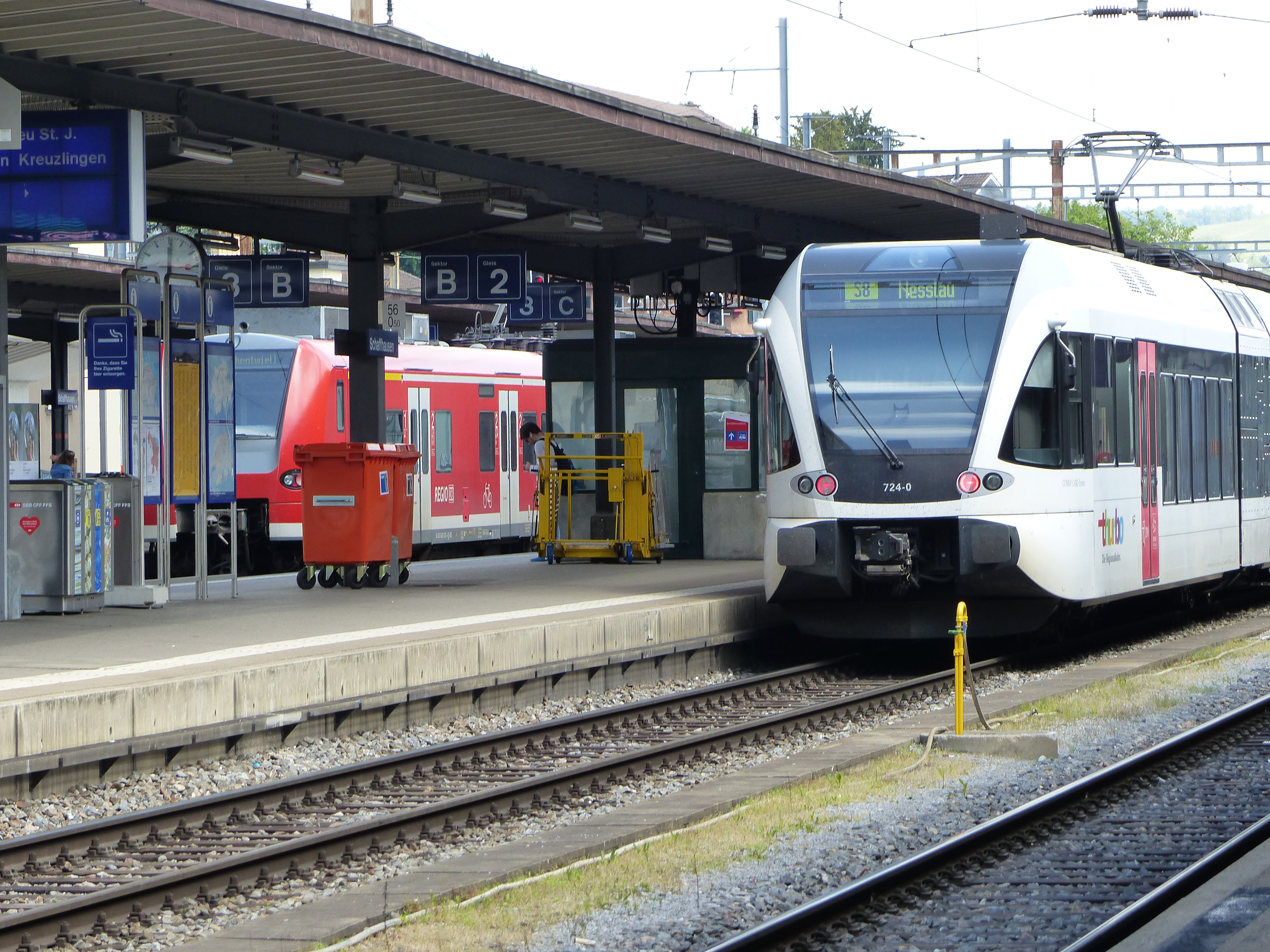 Bahnhof Schaffhausen, Bahnsteige